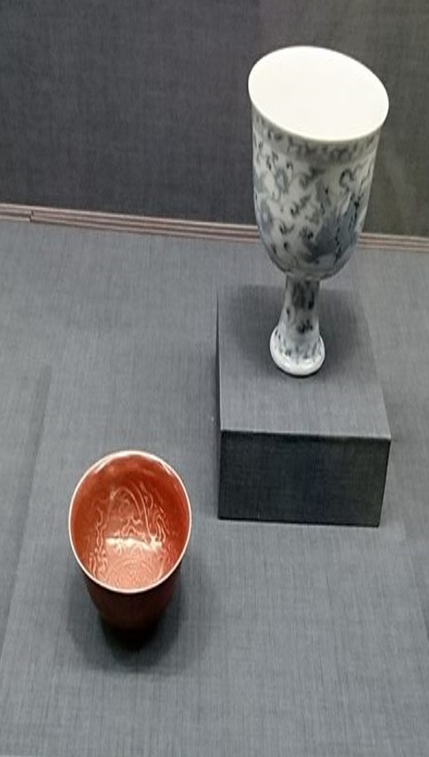 2017/3/25於臺北國立故宮博物院拍攝